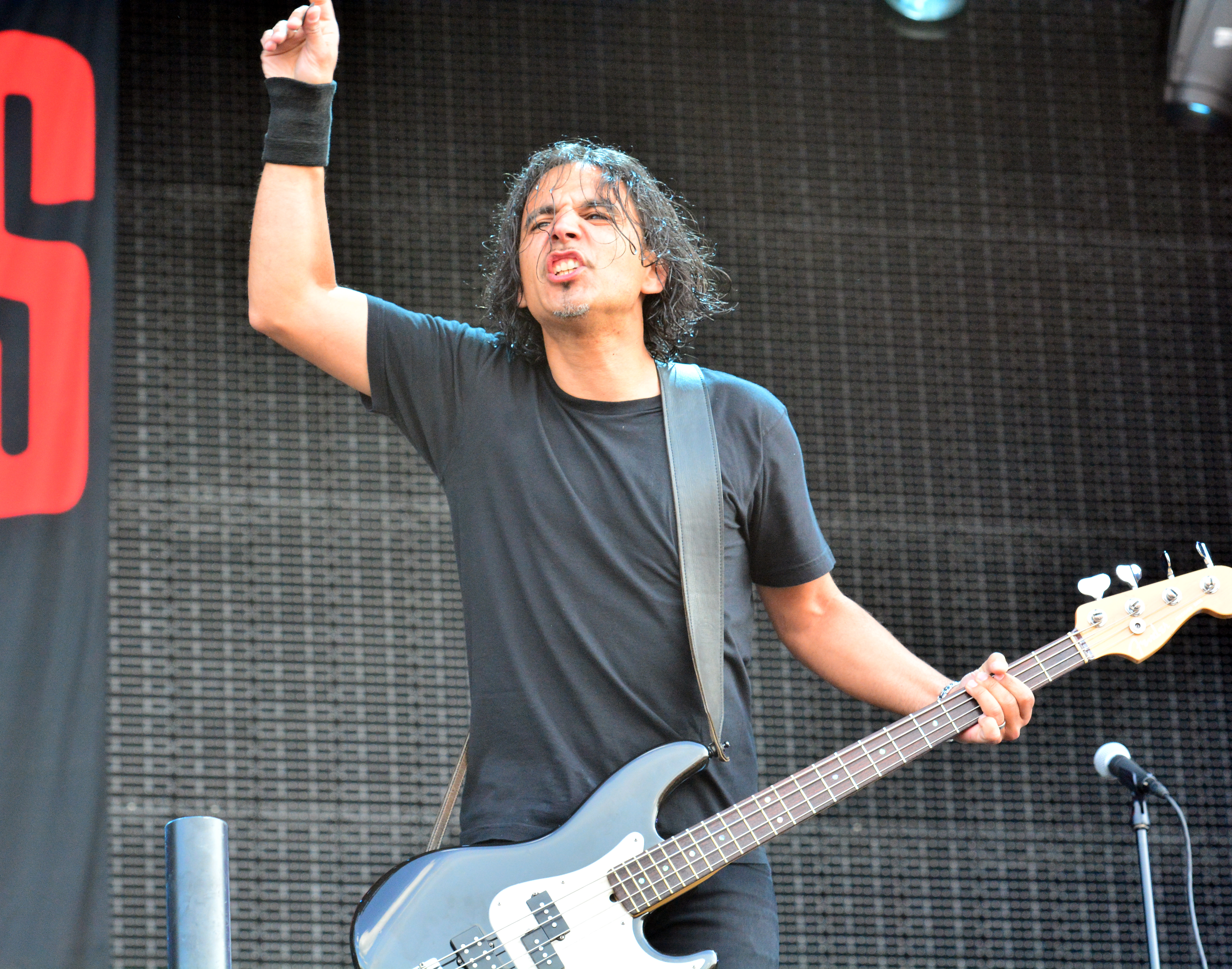 John Calabrese beim Wacken Open Air 2015